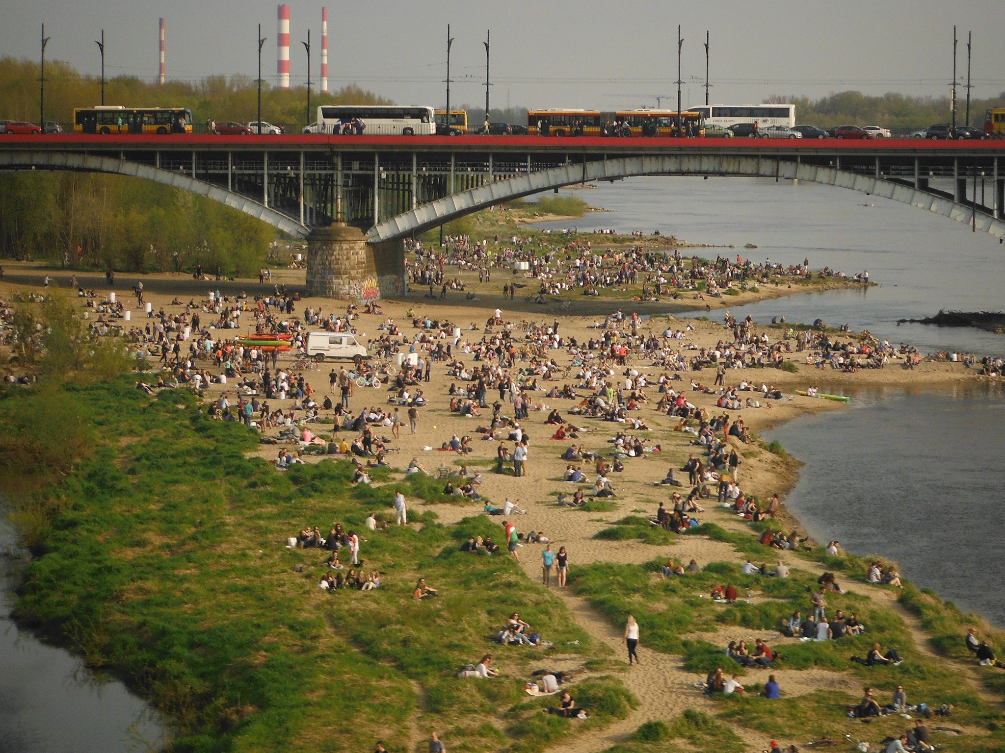 Plaża przy Moście Poniatowskiego w Warszawie.